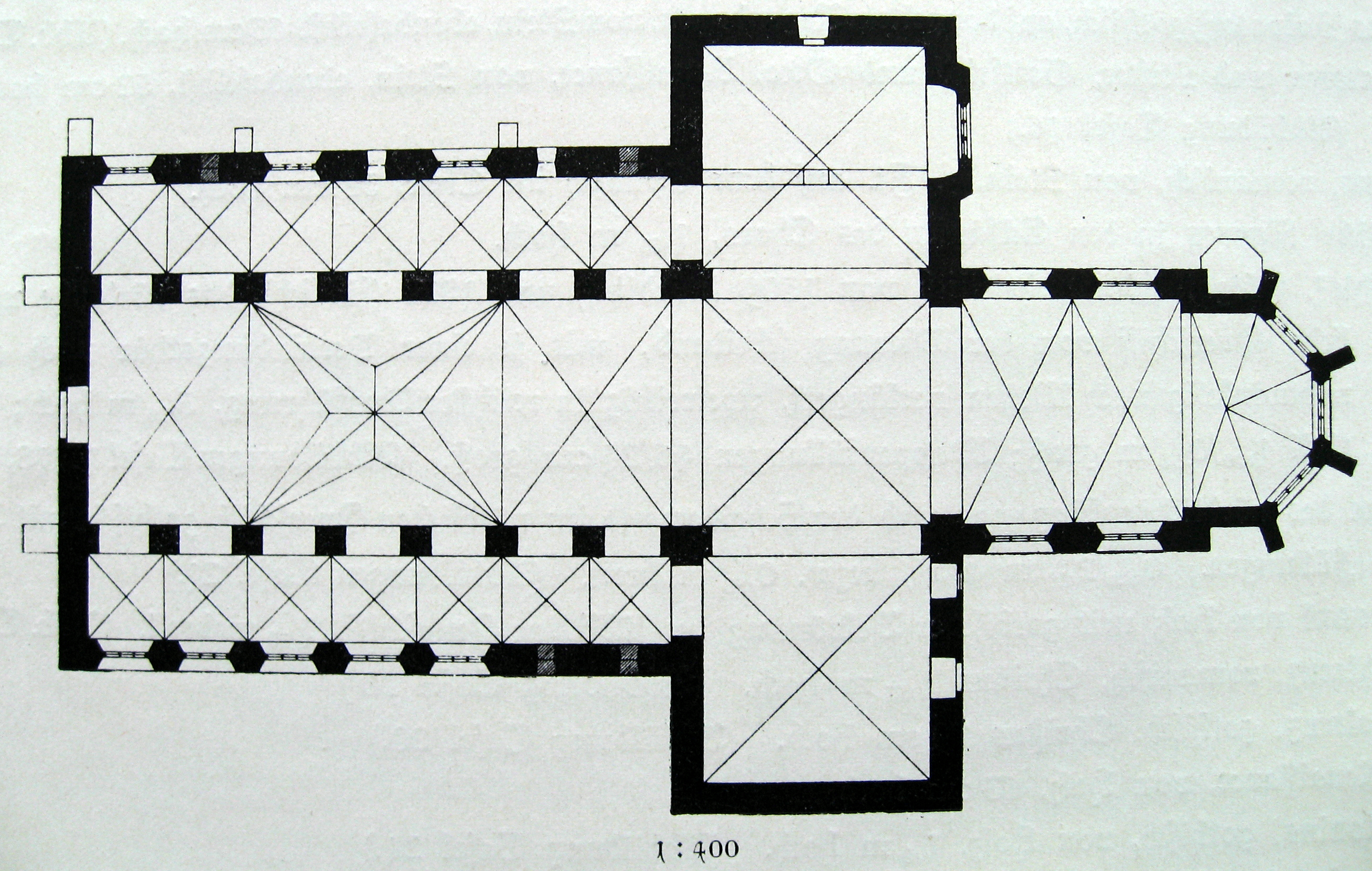 Cappenberg, Kirche, katholisch, romanisch, 12. Jahrhundert, Nord „Dreischiffige (dreijochige) Pfeilerbasilika mit Querschiff und zweijochigem Chor mit gothischem 5/8 Schluß. Ohne Thurm. Einfaches Glockenhaus neben der Nordseite der KKirche. Treppenthurm an der Nordseite des Chors, neu. Ursprünglich flach gedeckt; zu gothischer Zeit mit (verankerten) Kreuzgewölben versehen; im mittleren Joche des Mittelschiffs ein Sterngewölbe. Strebepfeiler vereinzelt.Die rundbogigen Fenster theilweise spitzbogig verbreitert; letztere dreitheilig mit Maßwerk. Drei Eingänge: an der Westseite, an der Nordseite des nördlichen und an der Ostseite des südlichen Querschiffs, ohne Schmuck. An der Ostseite des nördlichen Querschiffs nach außen vortretende Nische (Rest einer halbkreisförmigen Apsis).“